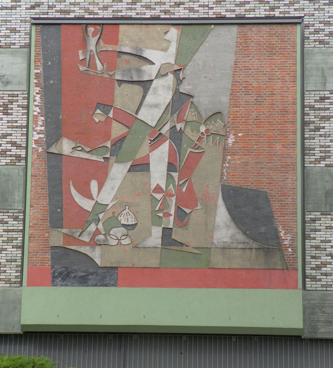 "Indisch tafereel" door Alfred van Werven. Voorheen aan geven Jan Fabriciusschool ter herinnering aan de jaren van Fabricius in Nederland-Indië. Herplaatst in 2005 aan zijgevel van flat die op de plaats van de school werd gebouwd